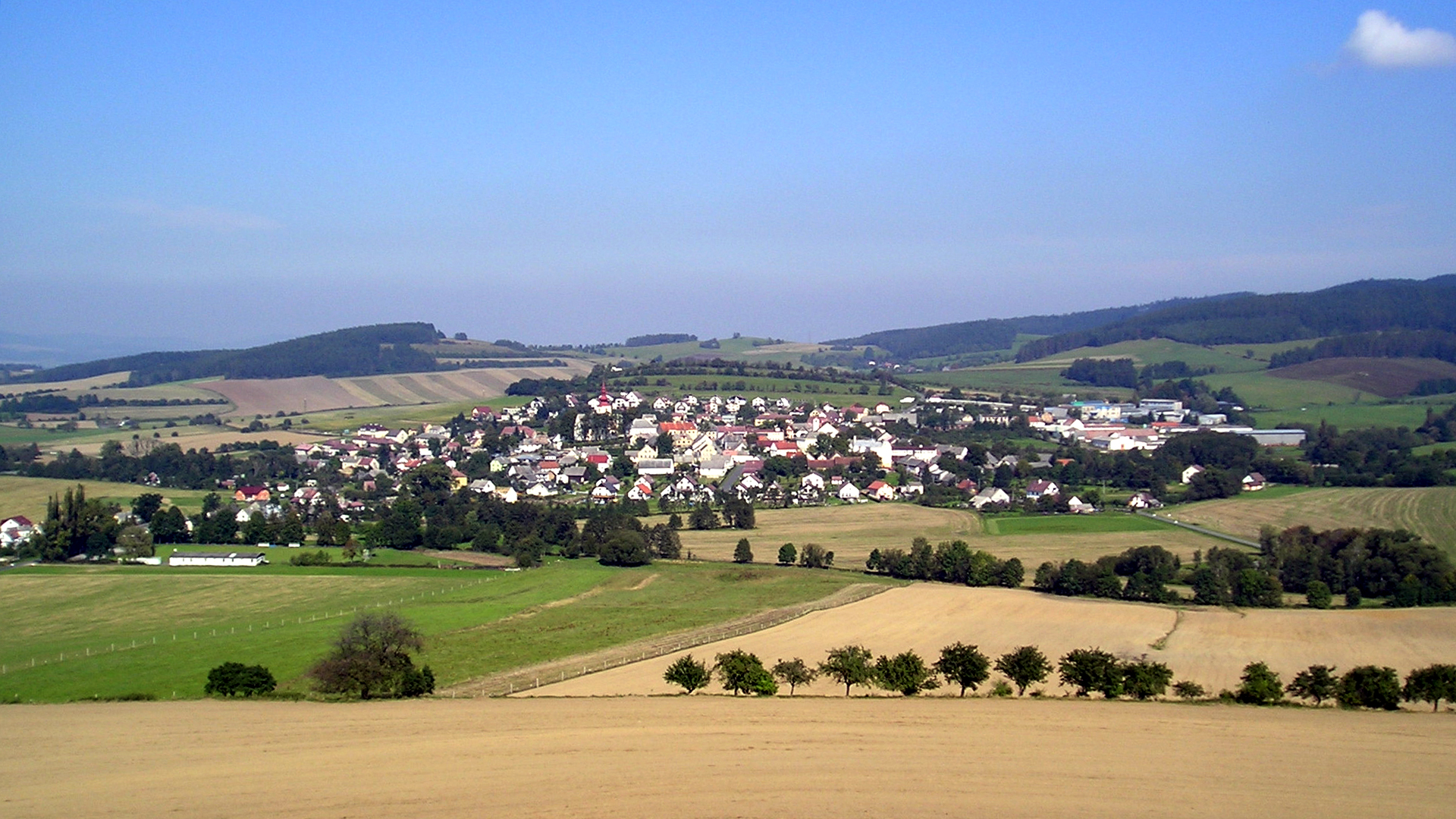 pohled na Strážov z Vápenice